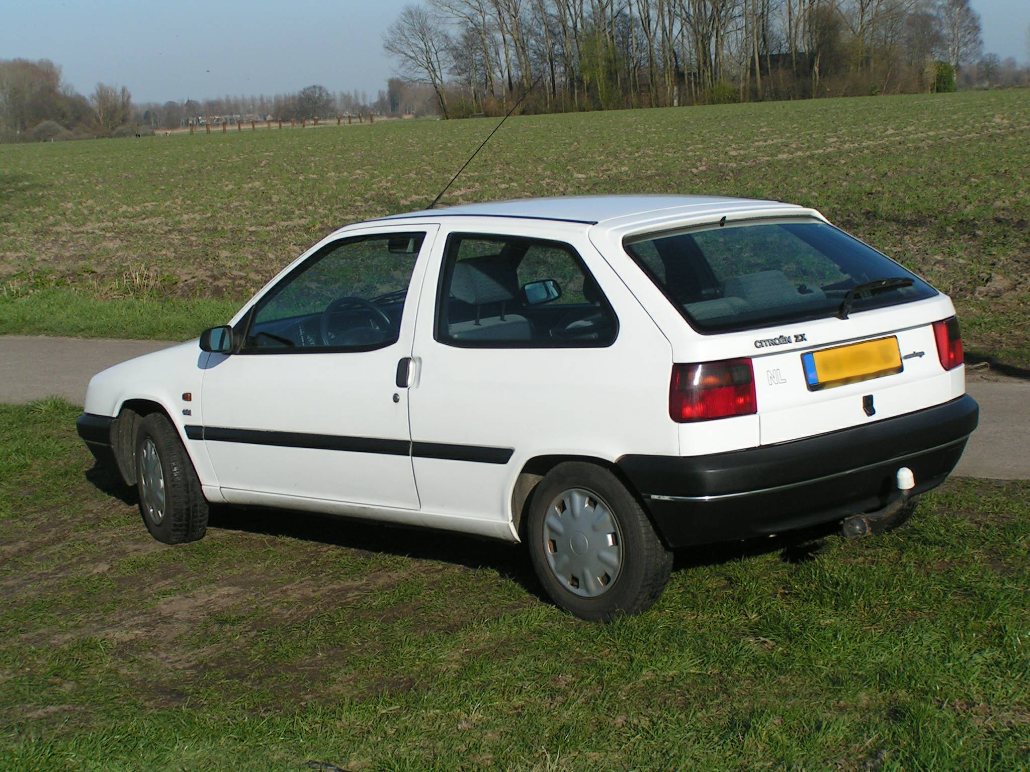 Citroën ZX z roku 1996